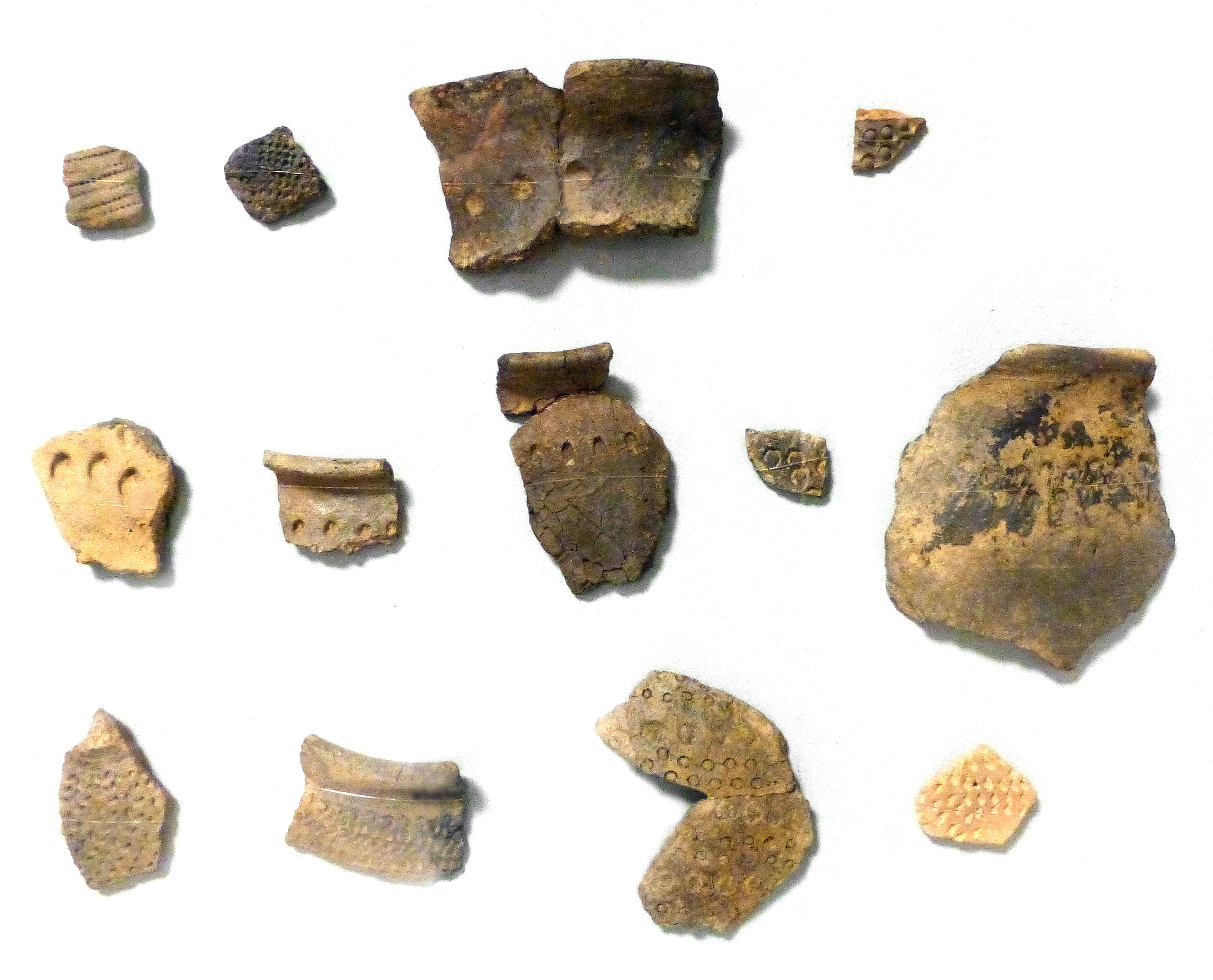 Céramique à décor imprimé trouvée à la Pierre d'Appel (Etival-Clairefontaine, Vosges). Second âge du fer. Musée Pierre Noël de Saint-Dié-des-Vosges.